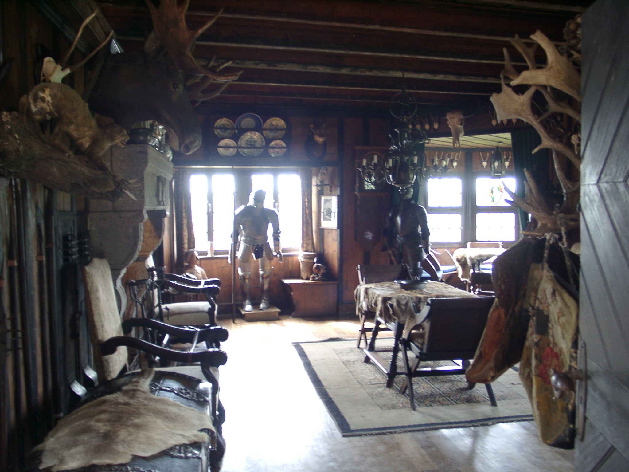 Burg Thurant, Jagdhaus mit Ausstellungsraum